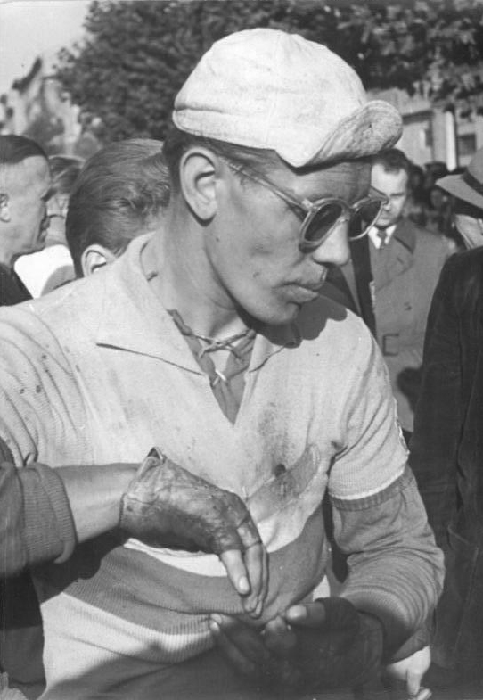 Nesl Illus Schmidtke 15.10.51 Friedensfahrt der Nationen beendet Am 14.10.51 trafen die Fahrer der "Friedensfahrt der Nationen", des Radrennens durch die DDR, am Ziel in Berlin ein. UBz: Der Sieger der 10. Etappe, Nesl, (CSR). Leihweise Illus Berlin ws.